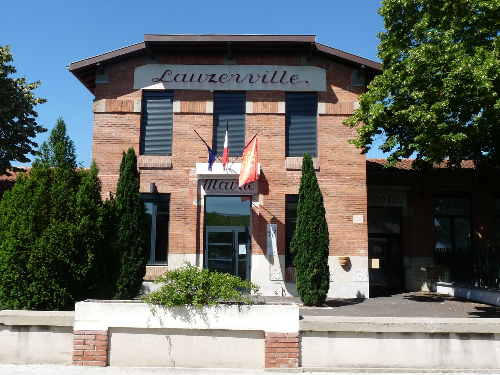 Mairie de Lauzerville, Haute-Garonne, France